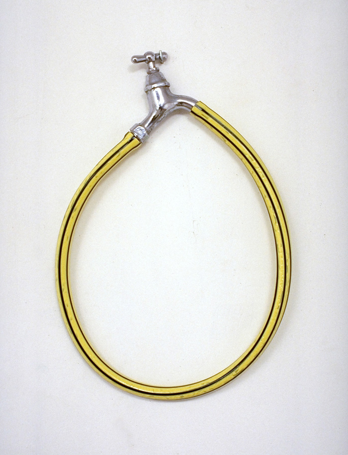 Kraan zonder titel (1986) als symbool voor hergebruik en kringloop is misschien wel de simpelste en helderste uitspraak van dit soort: de uiteinden van de slang zijn hier verbonden met de in- en uitgang van een kraan, als bij het oeroude symbool: de Ouroboros, de slang die in zijn eigen staart bijt.